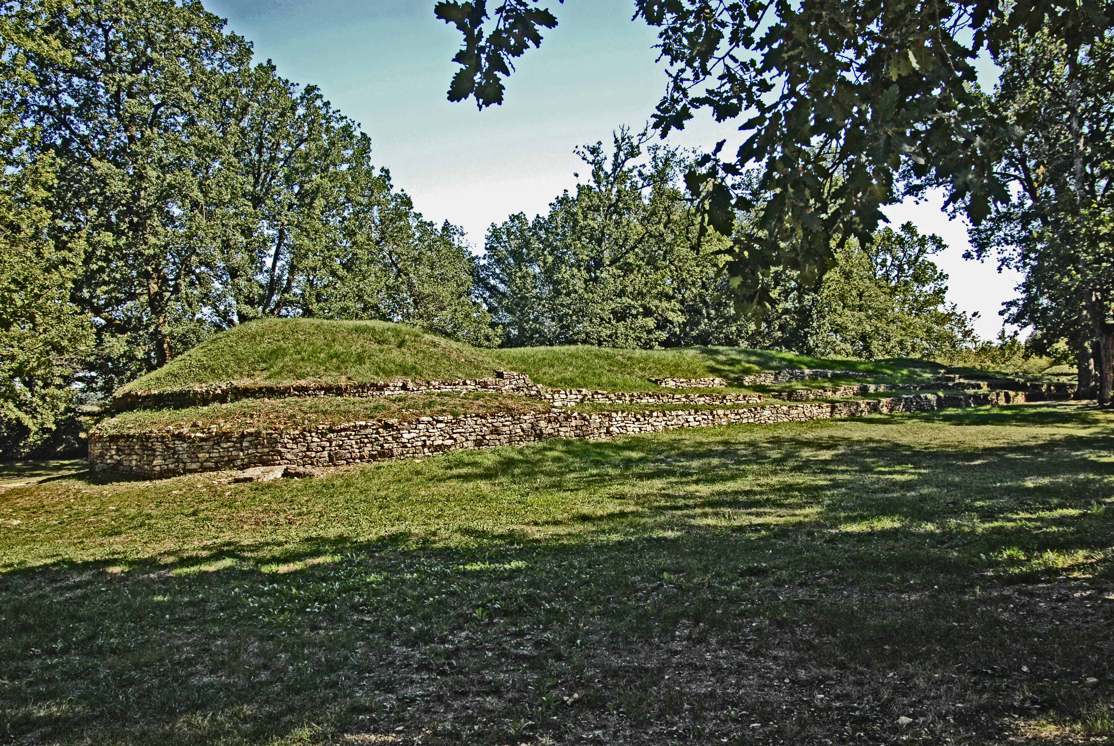 Tumulus F langgestreckt mit "Stufenpyramide" an den Enden